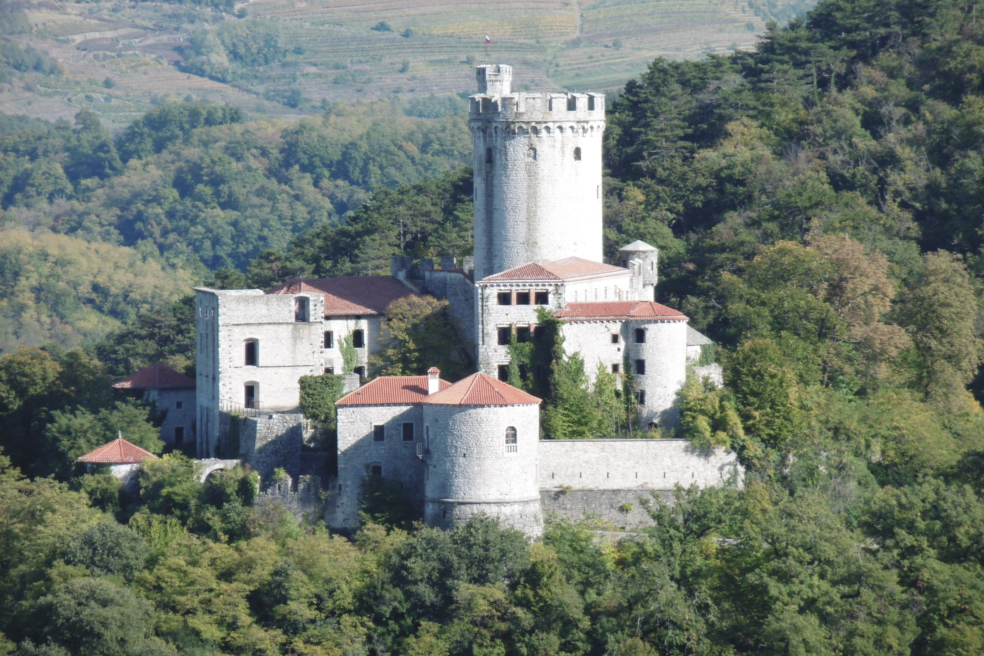 Castello di Branik